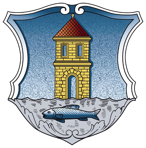 Der Turm im Stadtwappen soll symbolisieren, dass Lunzenau schon von alters her Stadtrechte besaß, in enger Abhängigkeit der Herrschaft Rochsburg. Der Fisch im unteren Teil weist auf die Bedeutung der Muldenfischerei für die Stadt in früheren Jahrhunderten hin. Dieses Wappen in Form und Farben trägt Lunzenau seit dem 18. September 1902.